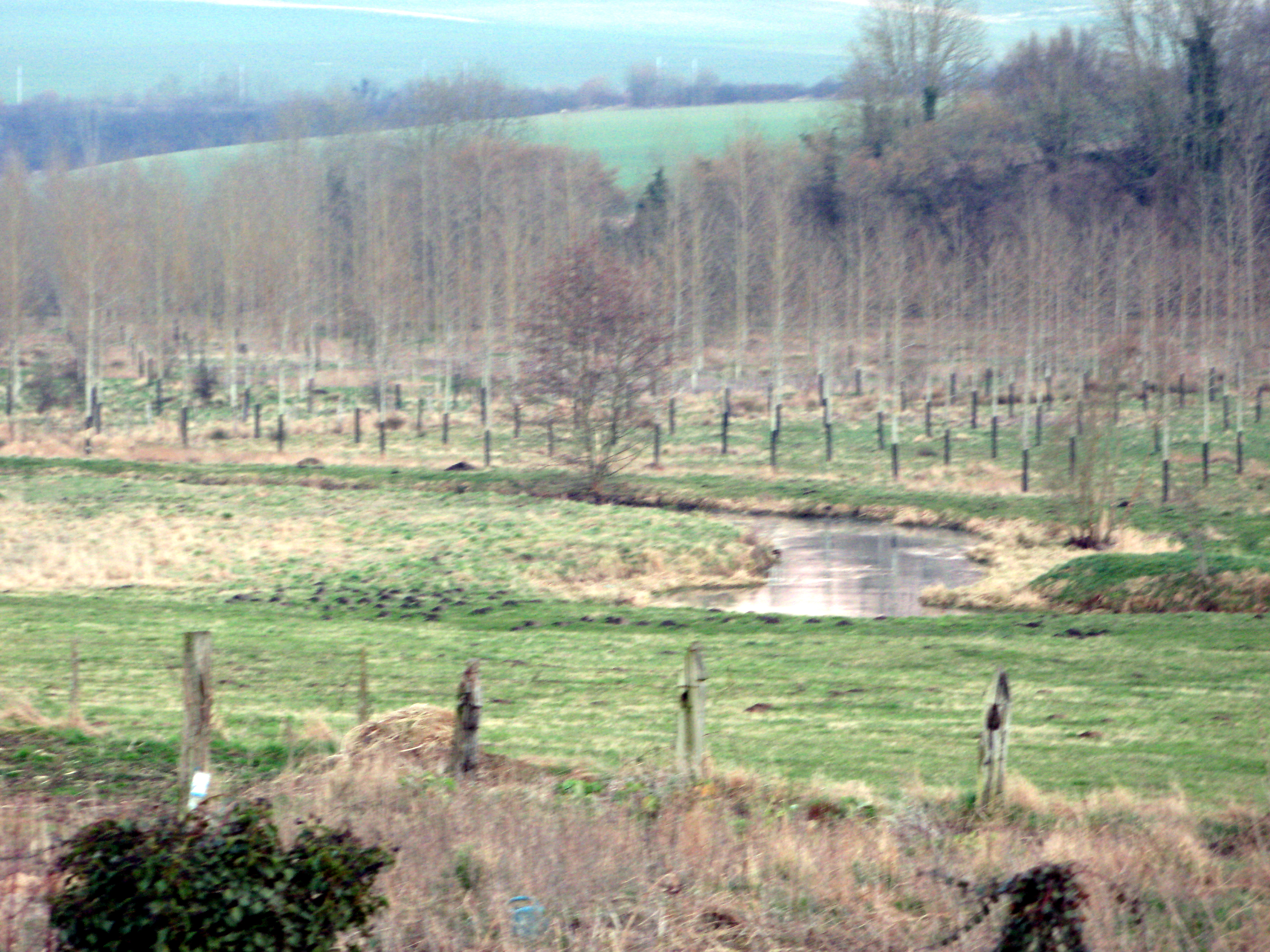 La Faloise (Somme, France) - Méandre de la Noye, en aval du village. (La photo est de qualité très médiocre ... car prise au zoom avec luminosité faible, à la tombée du jour.) .